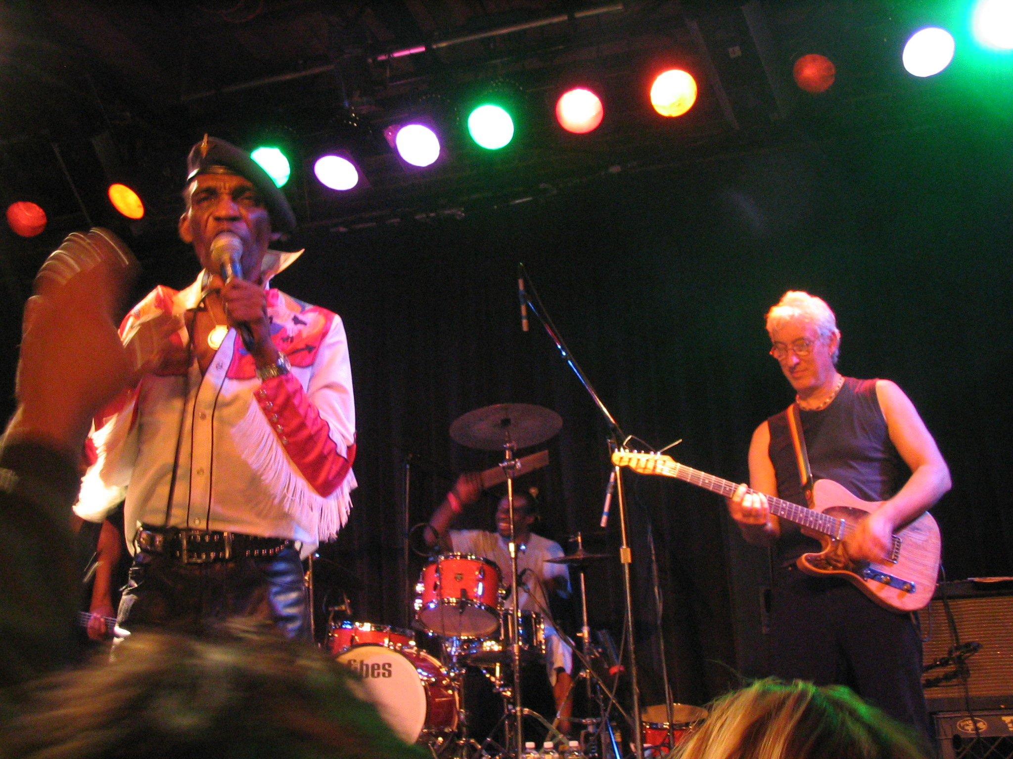 Desmond Dekker in San Francisco, USA.